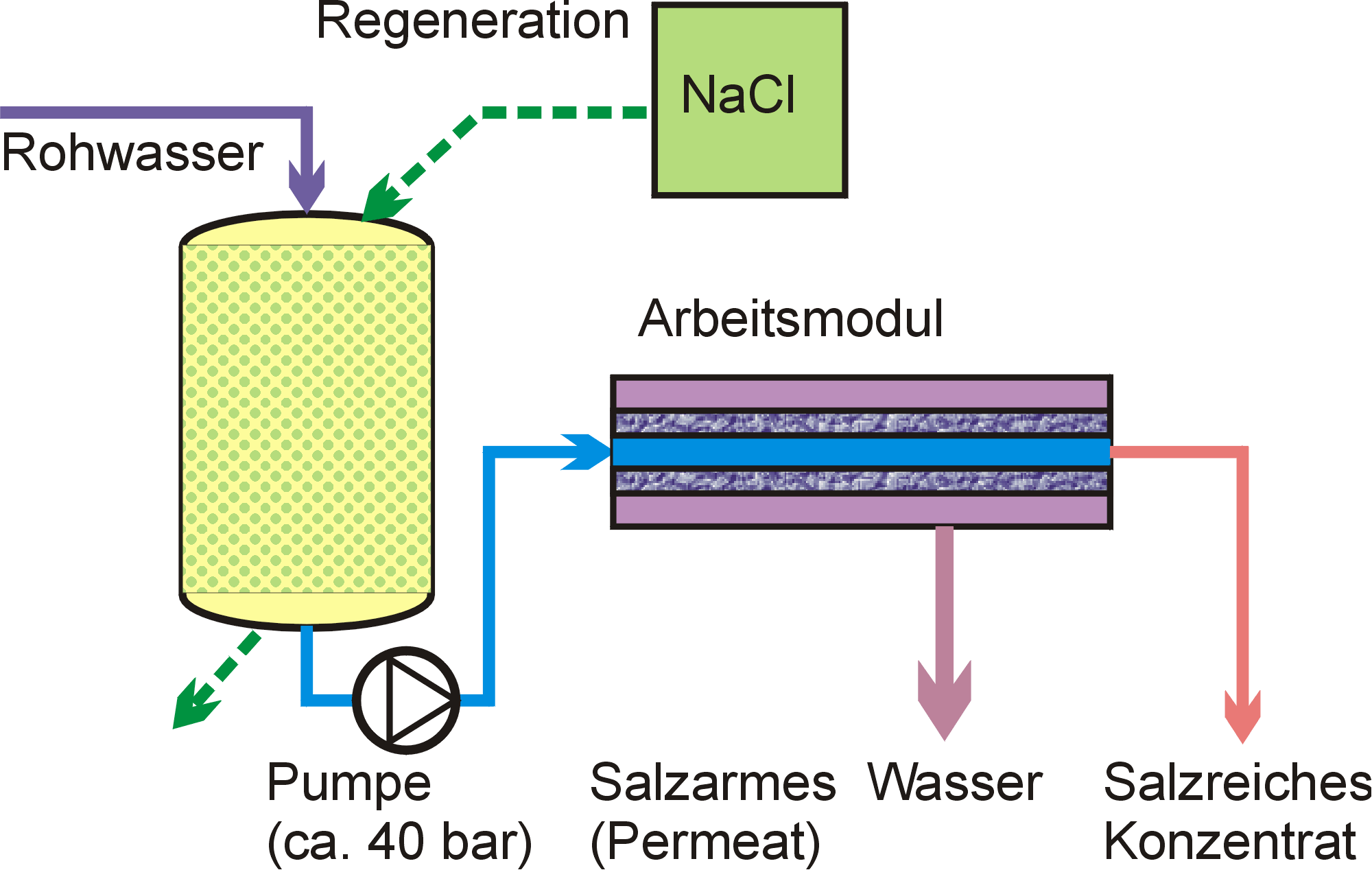 Wasseraufbereitung mit Umkehrosmose